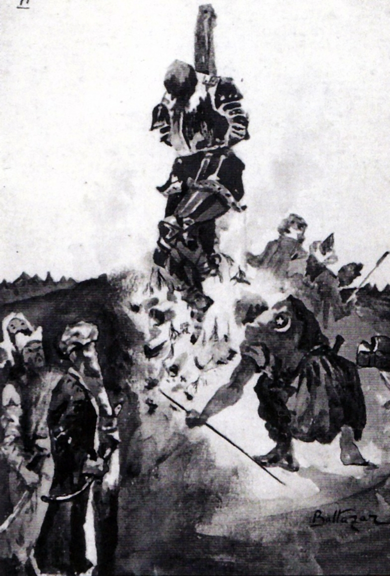 Arderea pe rug